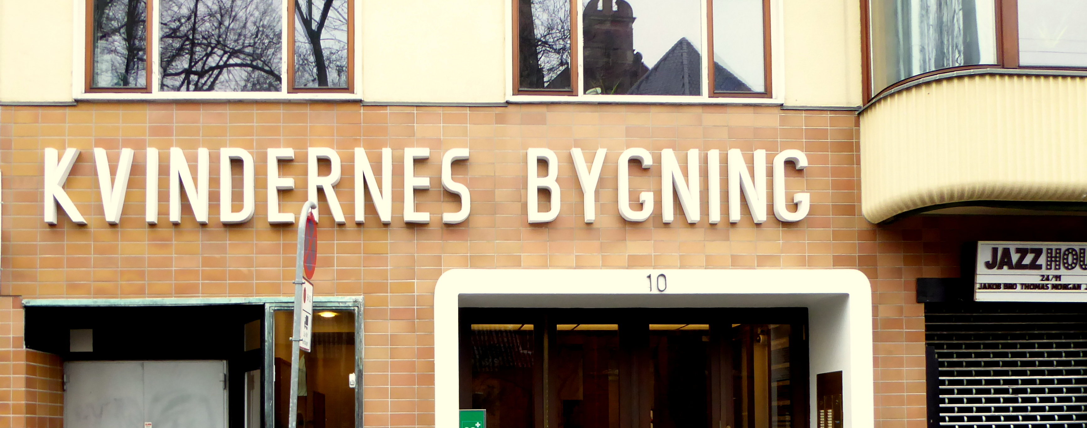 Kvindernes Bygning In Copenhagen, Denmark